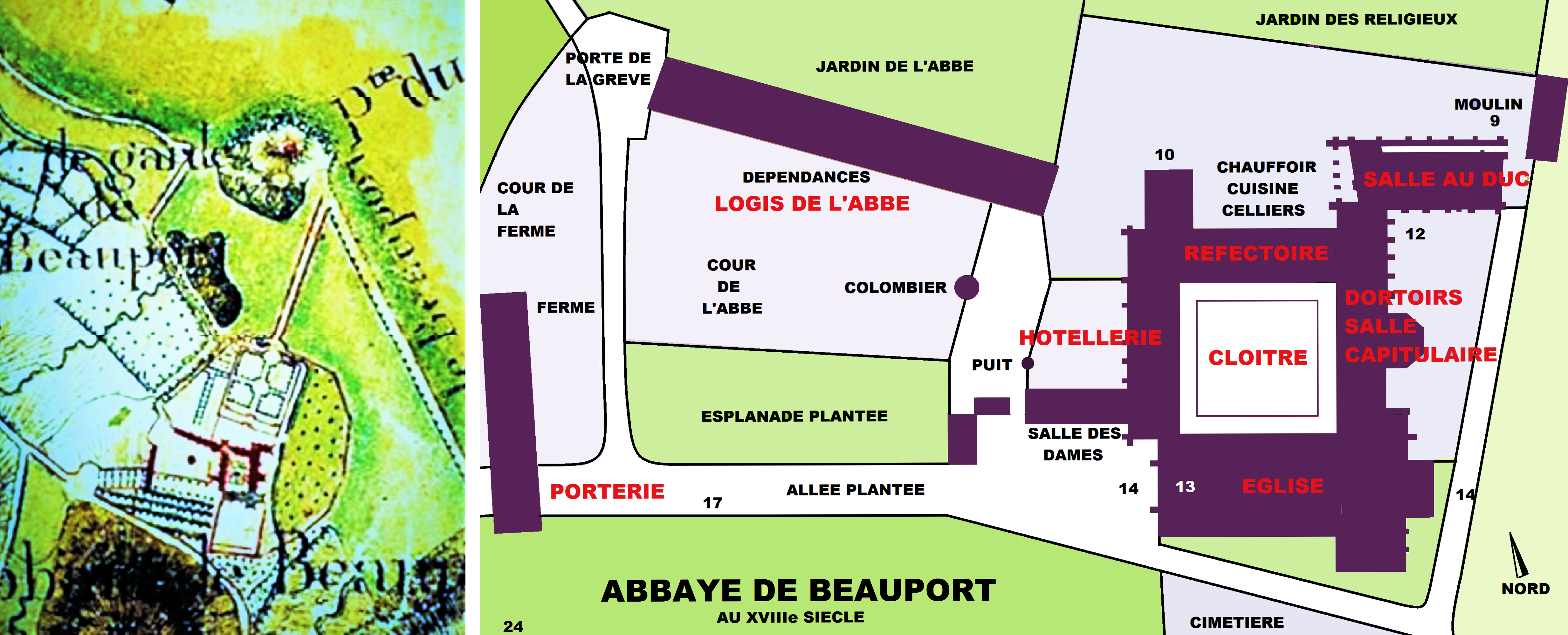 Paimpol,Côtes d'Armor, Abbaye de Beauport, Plan de situation et de masse au XVIIe siècle (avec insertion d'une image du domaine public modifiée)